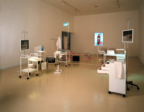 Sculpture